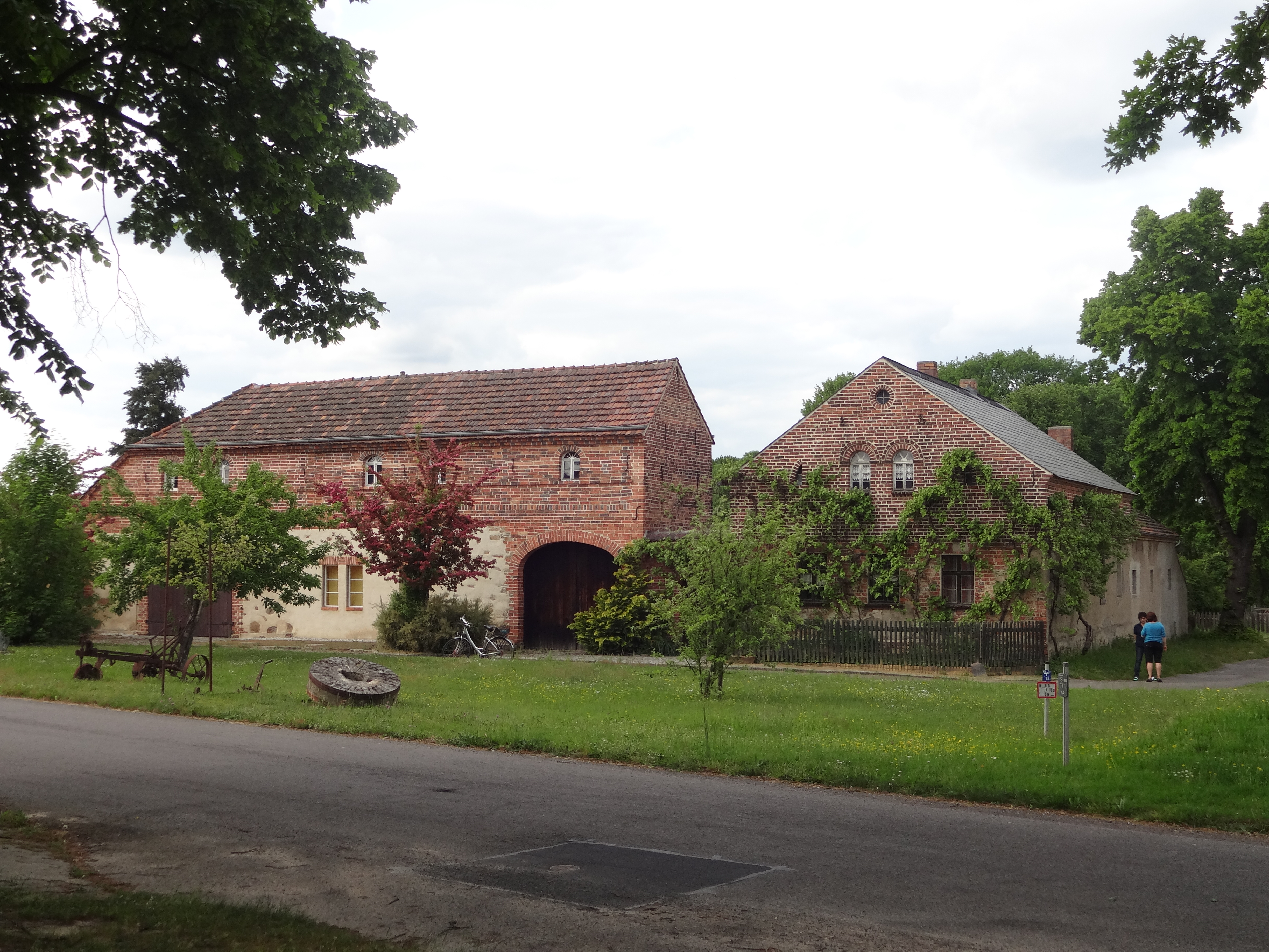 Ehemaliges Bauernmuseum Großkoschen